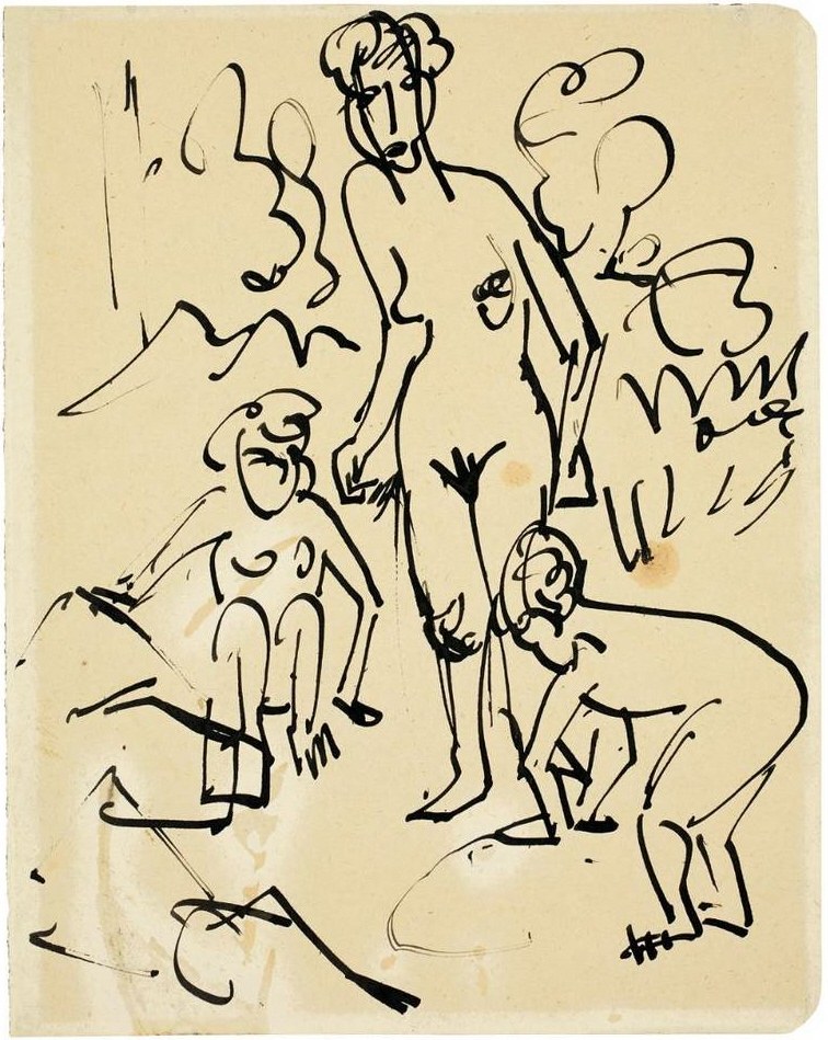 Mutter und Kinder. 1925. Tuschfeder auf glattem Papier (aus einem Skizzenbuch). 22 x 17,4 cm (Dargestellt sind Anna Müller (1900-1927), die Frau von Kirchners Künstlerfreund Albert Müller (1897-1926), und ihre 1923 geborenen Zwillinge Judith und Kaspar.)